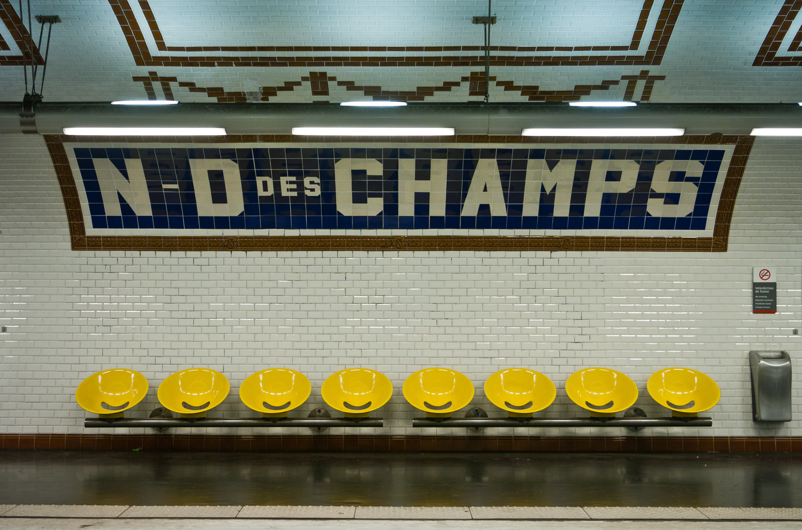 Notre-Dame-des-Champs (Paris Metro)